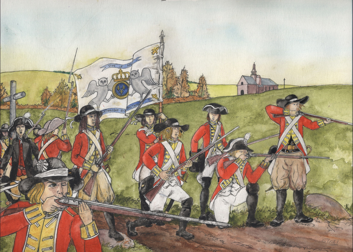 Chouans de larmée rouge en uniforme britannique lors de l'expédition de Quiberon